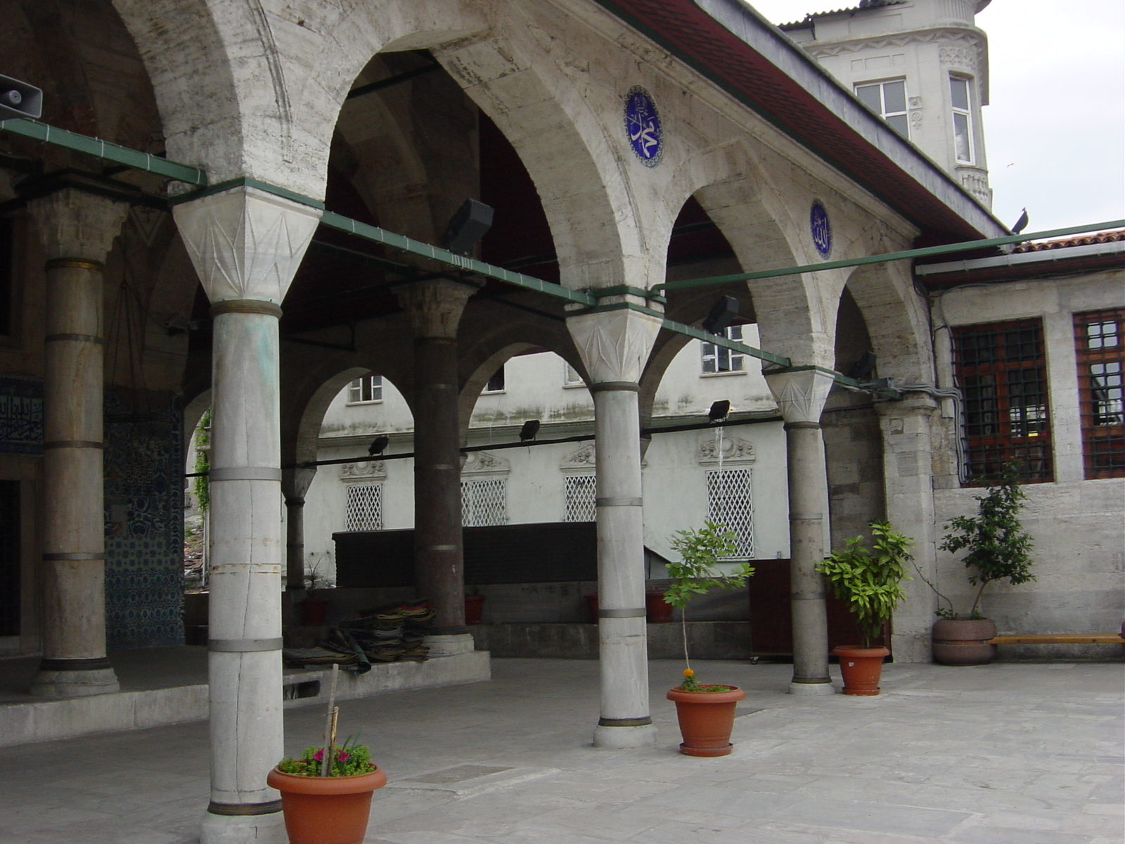 L'elegante portico rinascimentale della piccola ma splendida moschea detta "Rüstem Pasha camii, ad Istanbul. Foto di: Giovanni Dall'Orto, 25-5-2006.